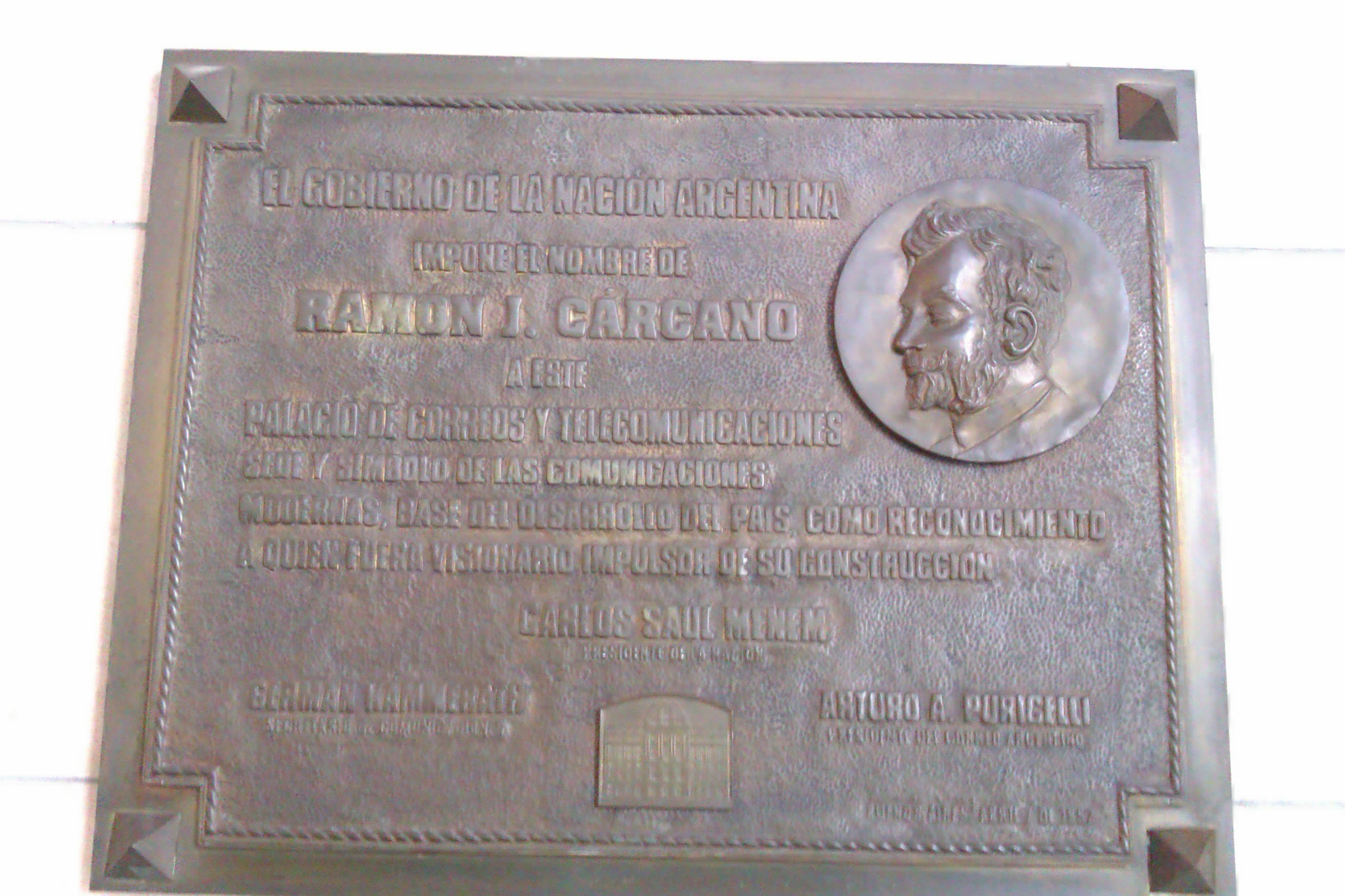 Placa en homenaje a Ramón J. Cárcano ubicada en el Centro Cultural Kirchner (CCK), ex Palacio de Correos y Telecomunicaciones.